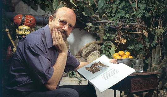 פרופסור לחקר המקרא עמנואל טוב